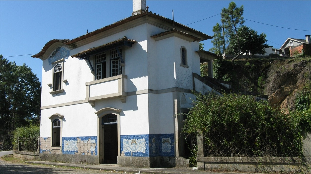 Projectada por Cassiano Branco, esta estação é uma versão "espelhada" da estação de Duas Igrejas, na linha do Sabor. Contudo nesta podemos disfrutar de uma bela paisagem sobre o Tâmega, o alto da Sra da Graça e a vila de Mondim que, ironicamente fica a 2 km dali: a estação é em Veade, no concelho de Celorico, que fica também num distrito diferente: Braga (Mondim é Vila Real - o rio tâmega faz o limite de distritos) Conta-se que esta estação possuiu um jardim incrível e que foi vencedora de vários prémios. Do jardim nada resta, e as placas dos prémios, se as teve também desapareceram (assim como qualquer mobília que houvesse na estação)